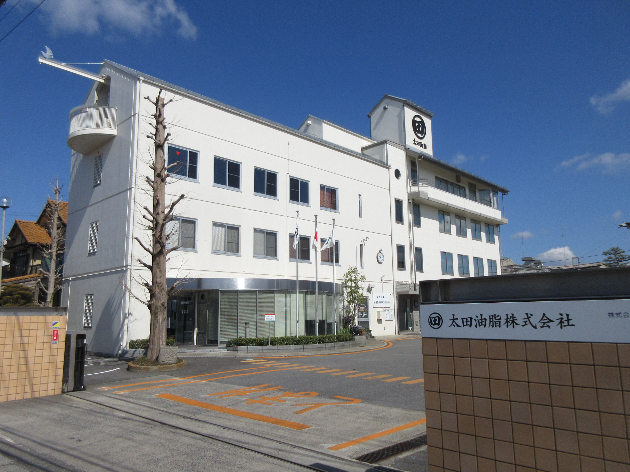 太田油脂株式会社（岡崎市福岡町）